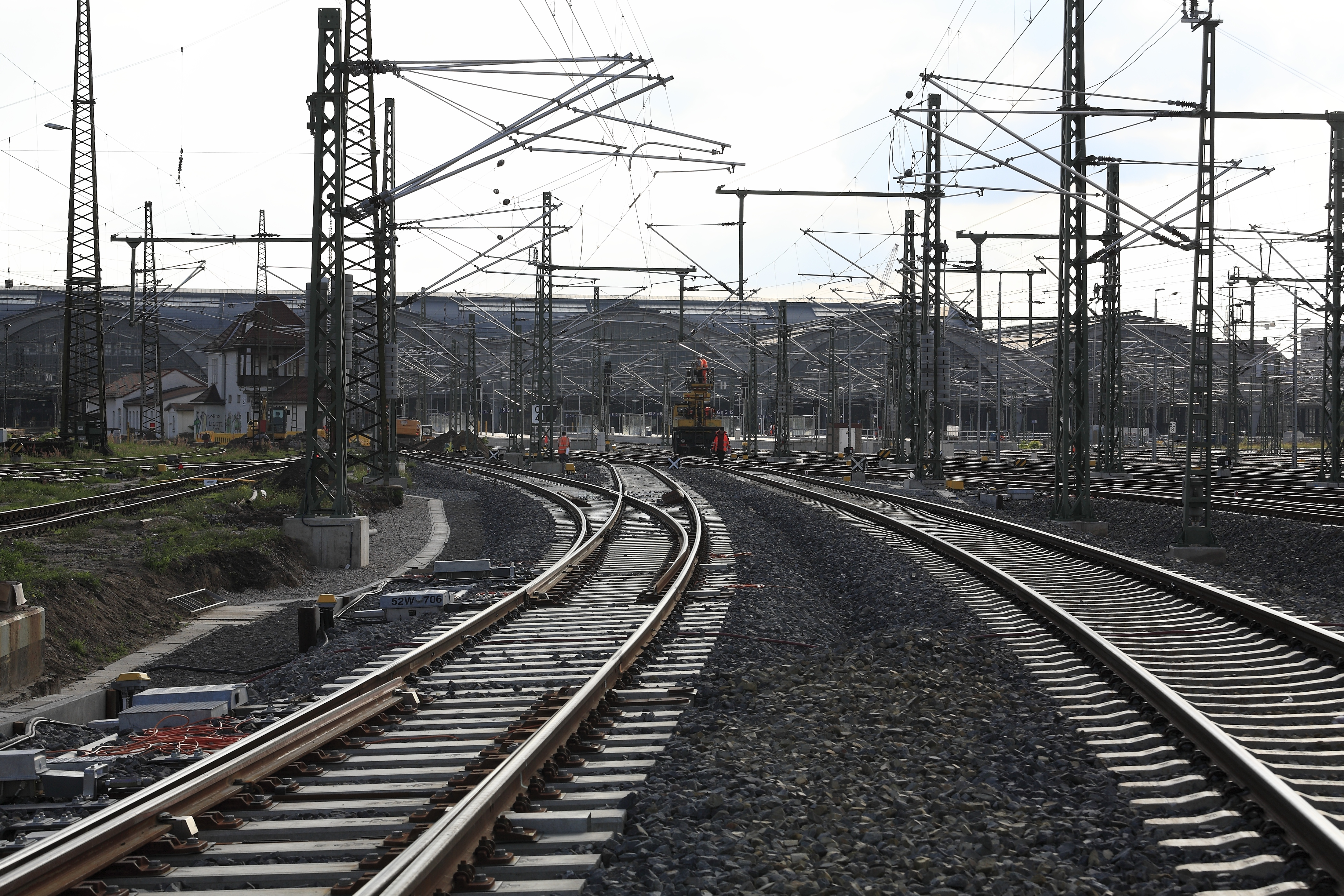 Stammgleise 15 und 14 der Strecke LD/6363 von Dresden in Richtung Bahnsteighalle, der linke Strang der Weiche 706 bindet die Bahnsteiggleise 16 bis 19 in Richtung Dresden ein. Links vor der Bahnsteighalle das ehemalige sächsische Befehlsstellwerk 2, davor die Altenburger Gruppe. Bis zum Umbau der Anlagen bildeten die Gleise 14 und 15 die Stammgleise der Strecke LC/6361 Richtung Connewitz und weiter nach Hof.